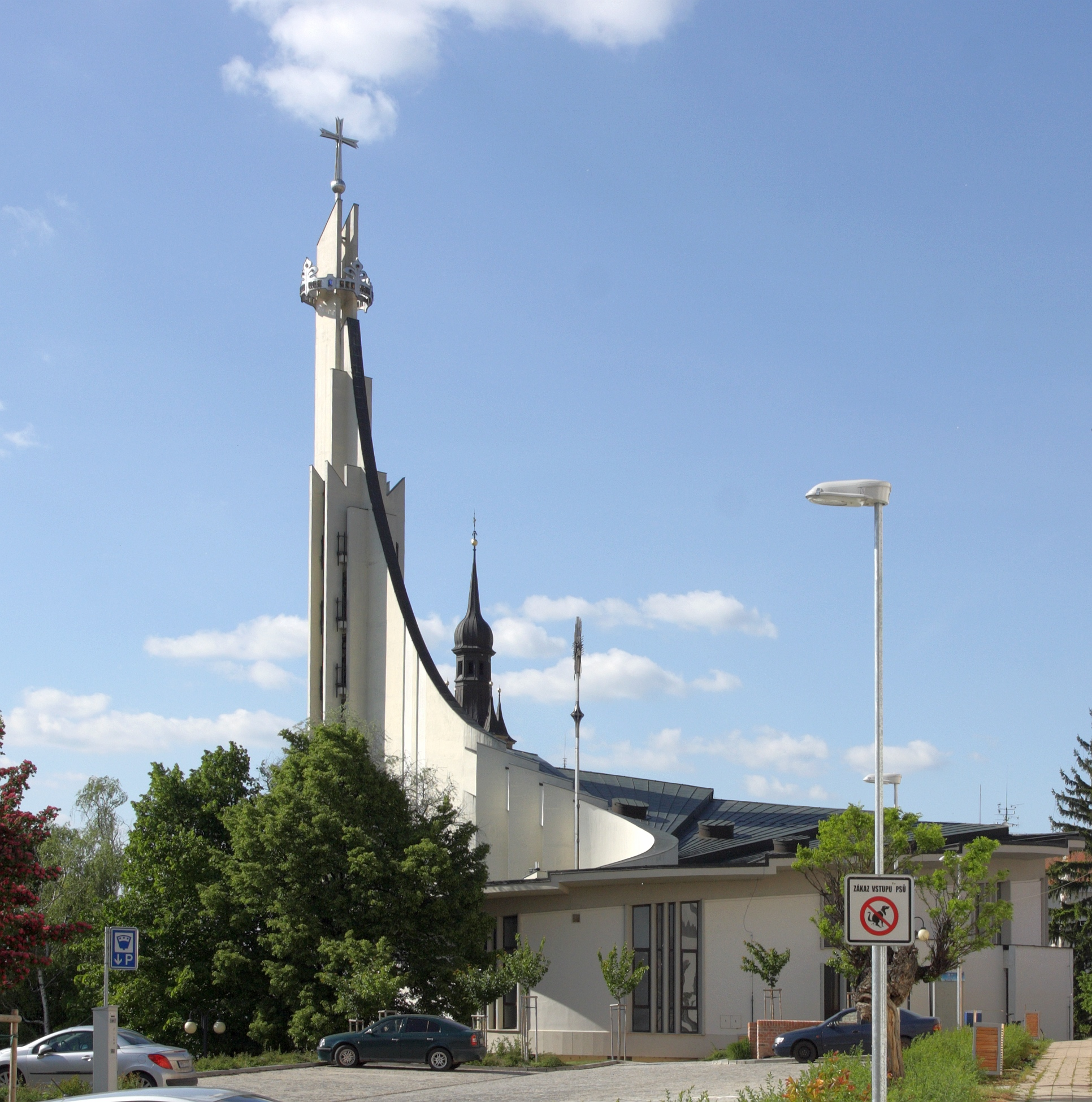 Hustopeče - kostel sv Václava, pohled z ulice Třebízského.